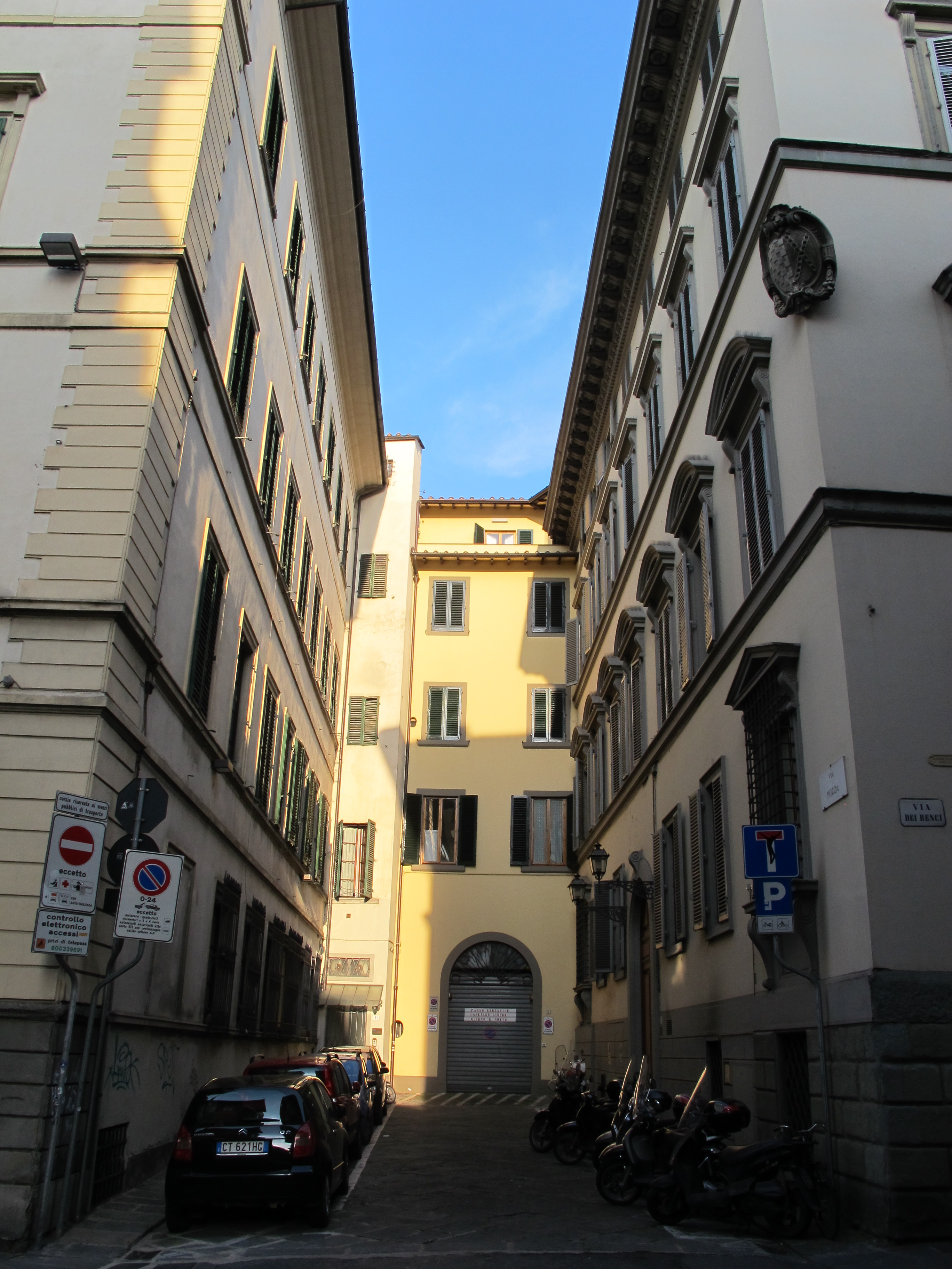 Firenze, via mozza